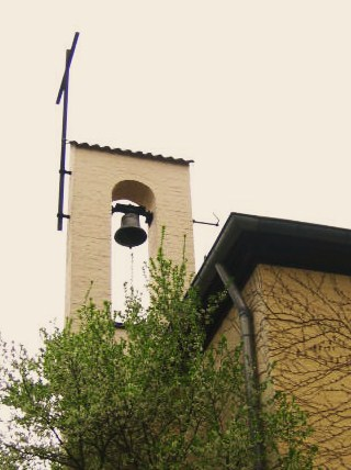 Alter Glockenträger der Erlöserkirche in Köln-Rodenkirchen.